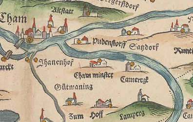 Ausschnitt aus Philipp Apian - Bairische Landtafeln von 1568